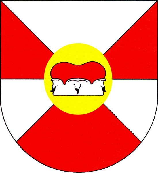 Znak obce Nové Sedlo